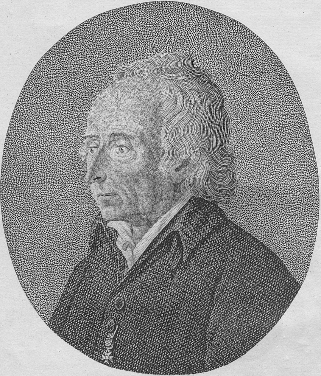 Franz von Fürstenberg